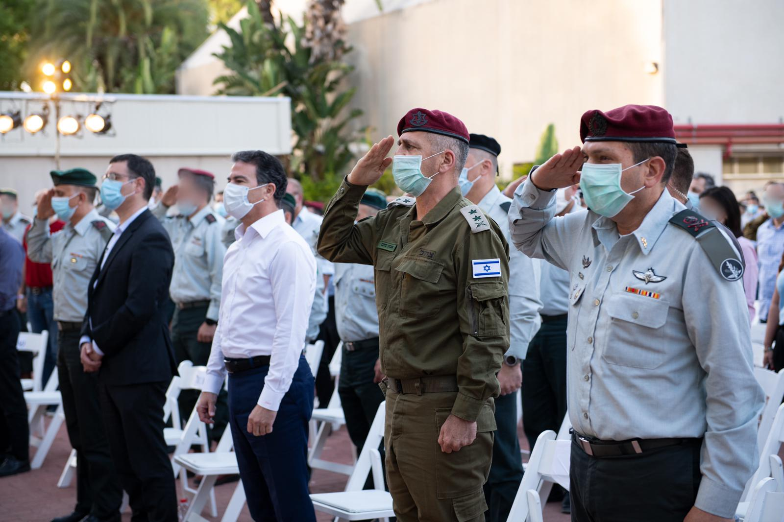 טקס סיום הפעילות במרכז השליטה הלאומי למאבק בקורונה , מימין לשמאל:ראש אגף המבצעים בצה"ל, אלוף אהרון חליוה, הרמטכ"ל רא״ל אביב כוכבי, ראש המוסד, יוסי כהן ,מנכ"ל משרד הבריאות, משה בר סימן-טוב וראש אגף המודיעין, אלוף תמיר הימן